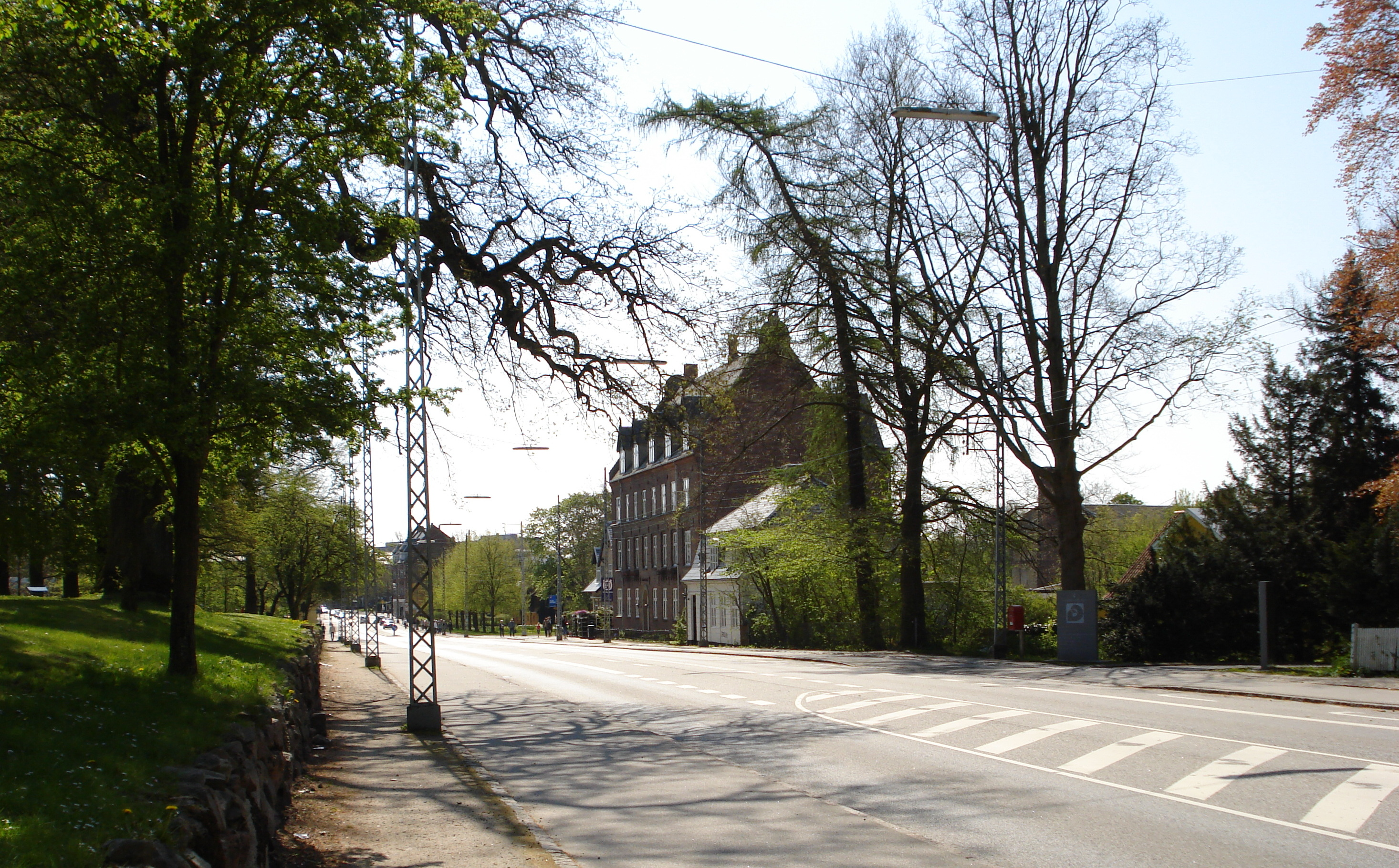 Den nordlige del af Lyngby Hovedgade med udsigt til etageejendommen Lyngby Hovedgade nr. 8A, Sorgenfrihus (The northern part of Lyngby Hovedgade with a view towards the building at no. 8A, Sorgenfrihus)